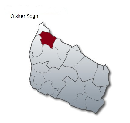 Olsker Sogn